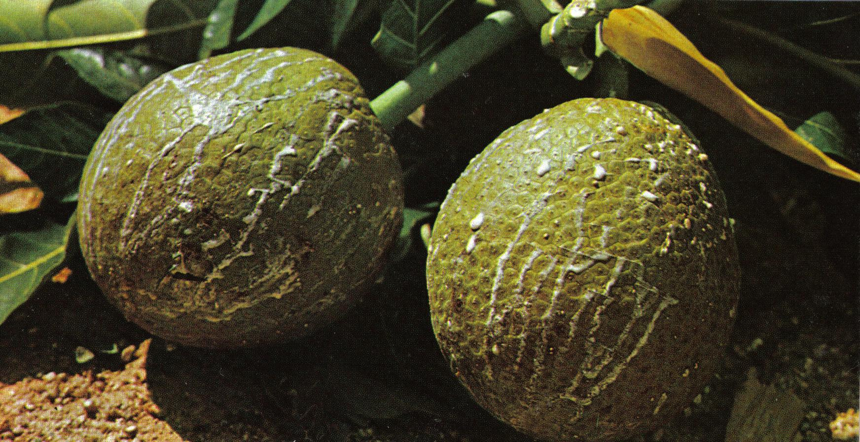 Breadfruits